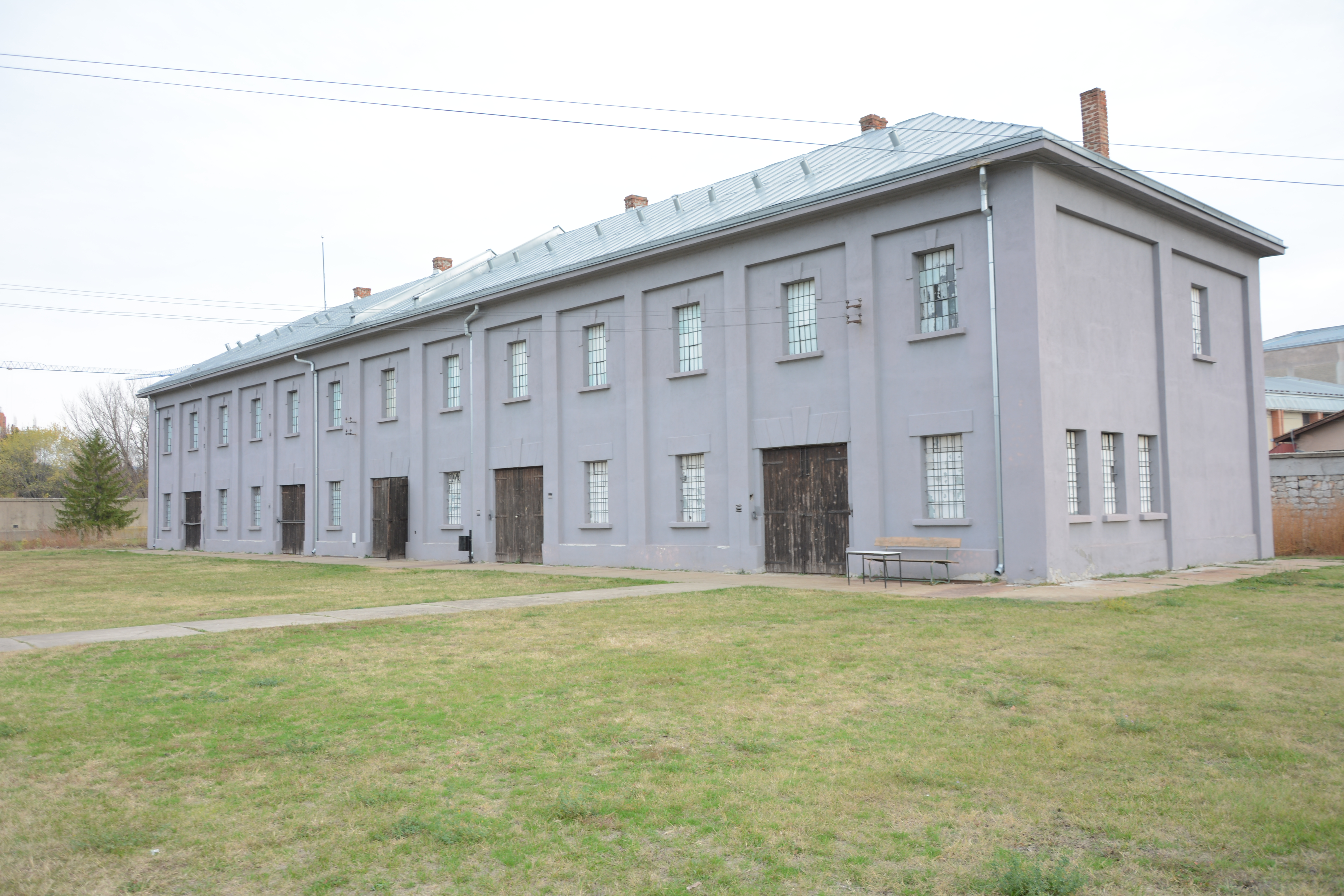 Меморијални комплекс, Логор 12. фебруар